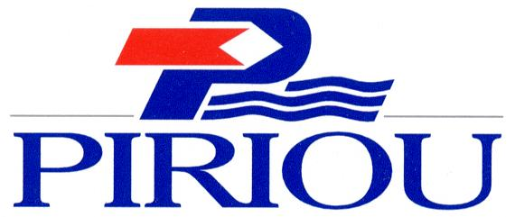 photo PIRIOU